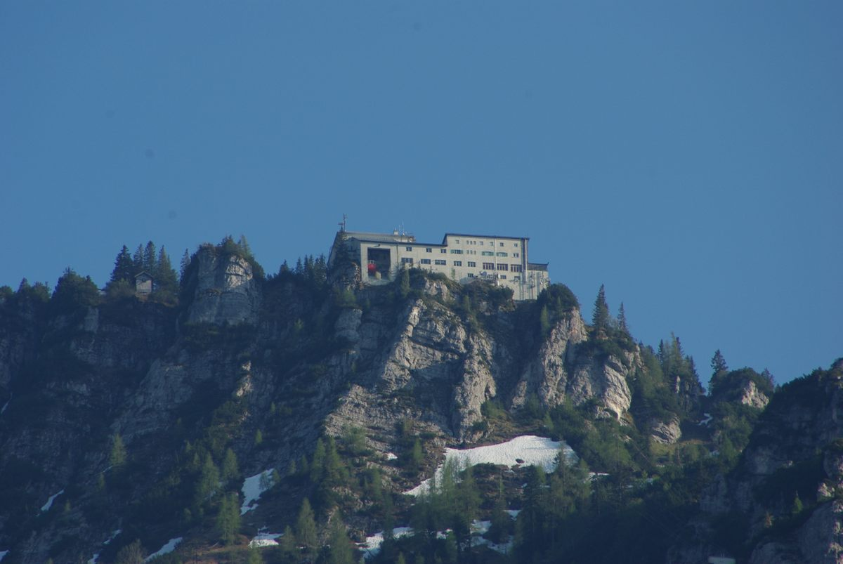 Berghotel PredigtstuhlbahnThis is a photograph of an architectural monument.